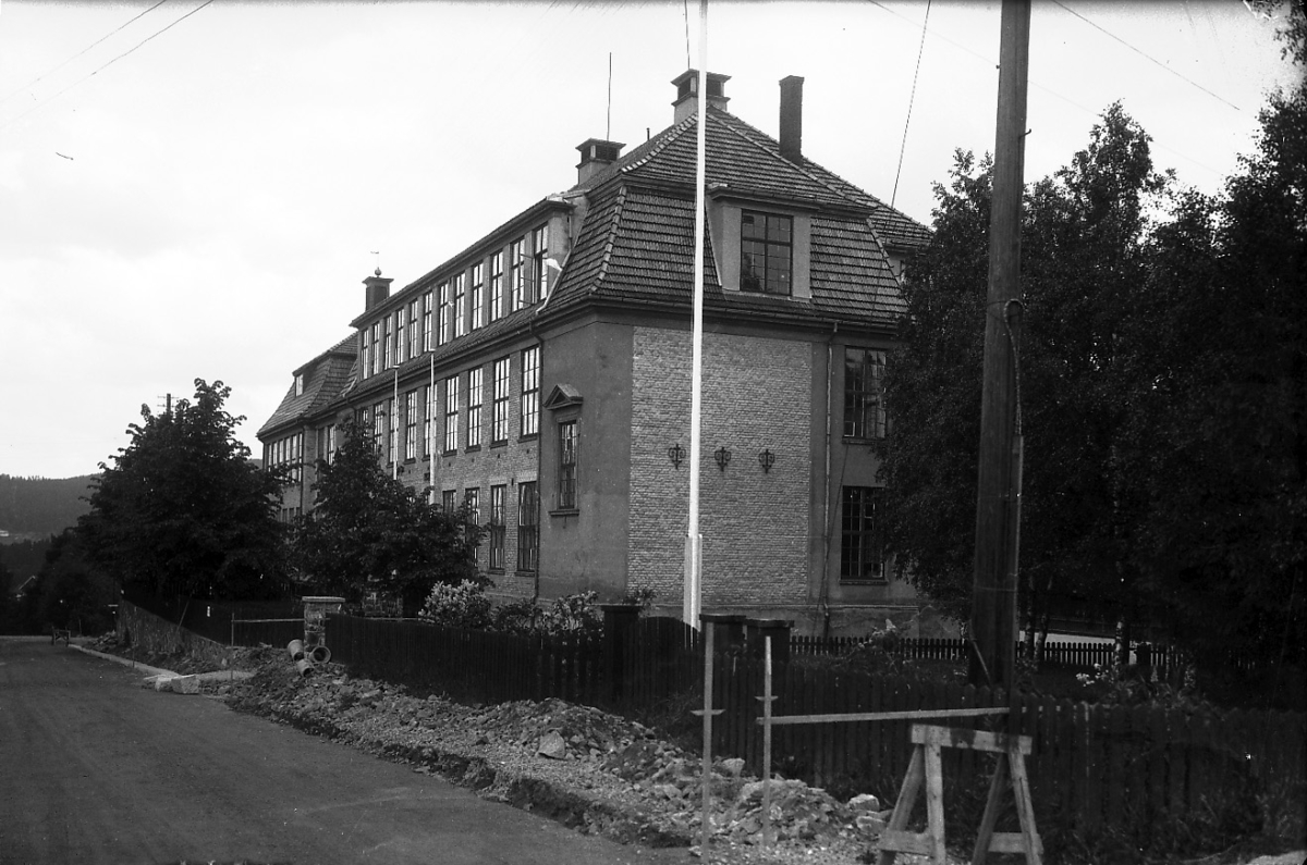 Vinderen skole, ca 1940